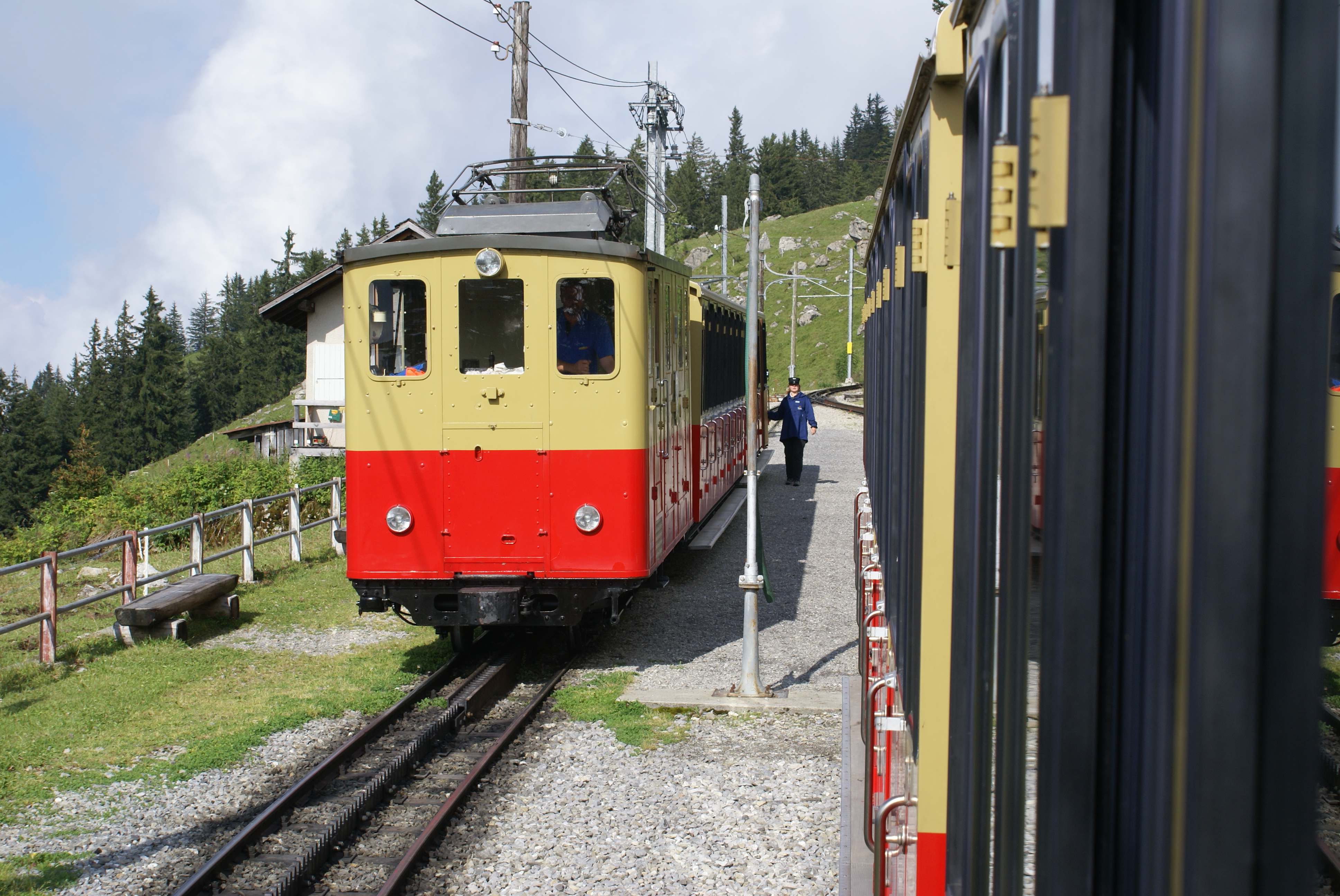 Zahnradbahn zur Schynige Platte